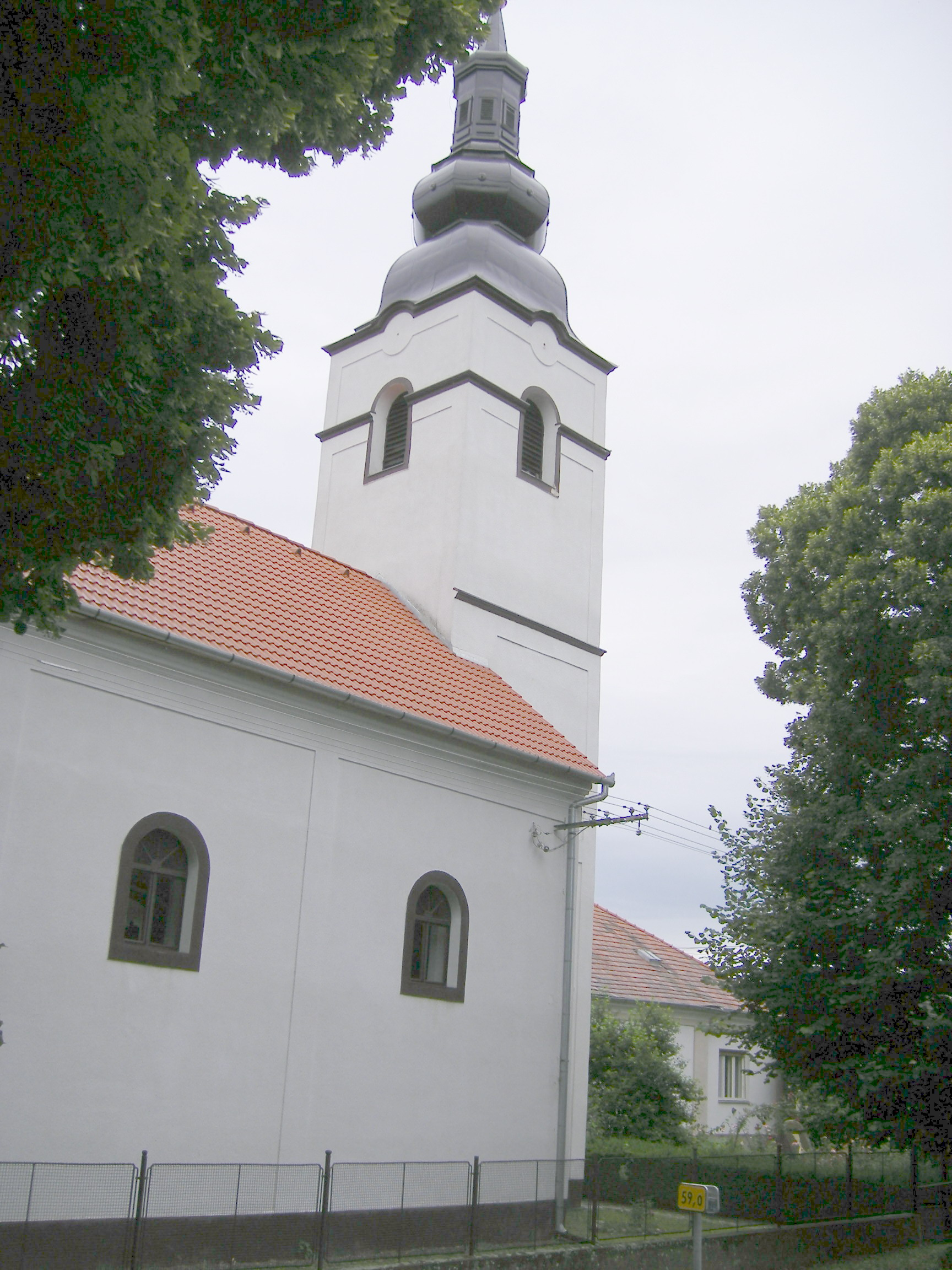 Nový Tekov (okres Levice)